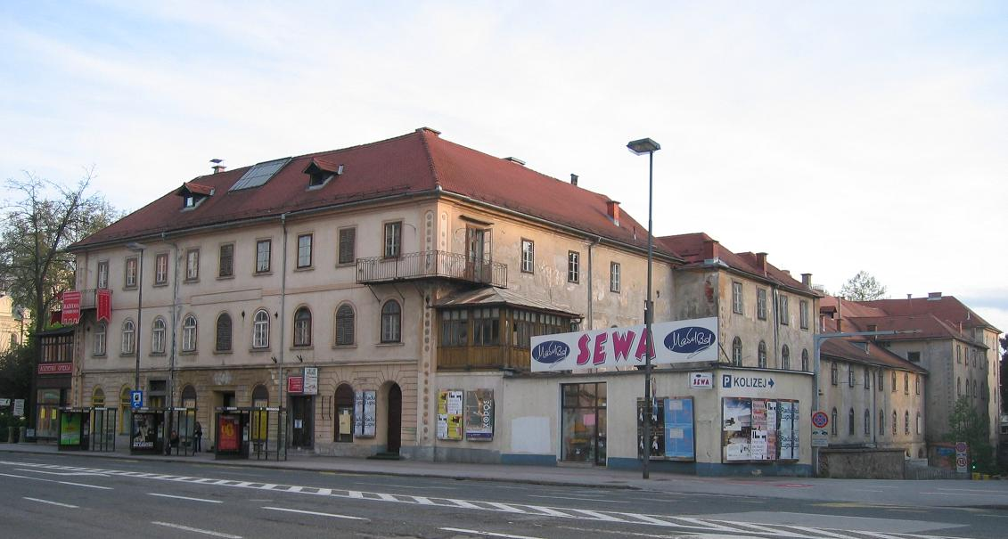 Kolizej bldg., Ljubljana photo:Ziga 20:45, 8 May 2006 (UTC)